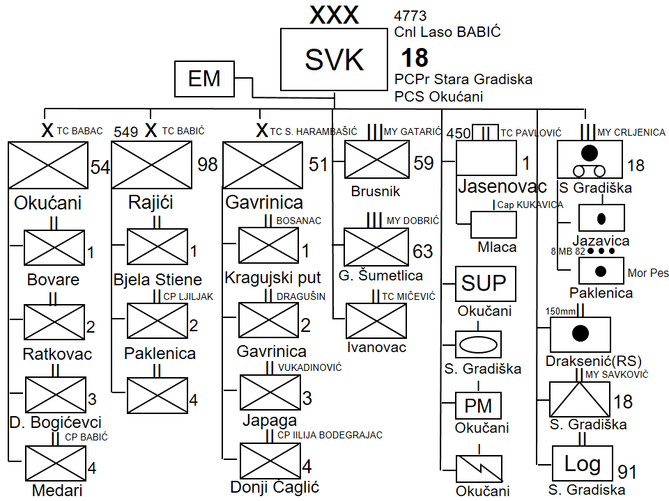 Elaborado sobre la base de: Brigović, Ivan; Martinić Jerčić, Natko; Radoš, Ivan (2015). «Vojno Redarstvena Operacija Bljesak». Hrvatski memorijalno-dokumentacijski centar Domovinskog rata (en inglés) (Zagreb). Consultado el 01 de septiembre de 2018. Republic of Serbian Krajina. Main Staff of the Serbian Army (13-07-1995). Report of the Commission Charged with Establishing Responsibility of the Orgazization for ther Fall of Western Slavinia (en inglés). Documento ICTY 0281-1094-0281-1105-EDt.doc/zv. Knin.